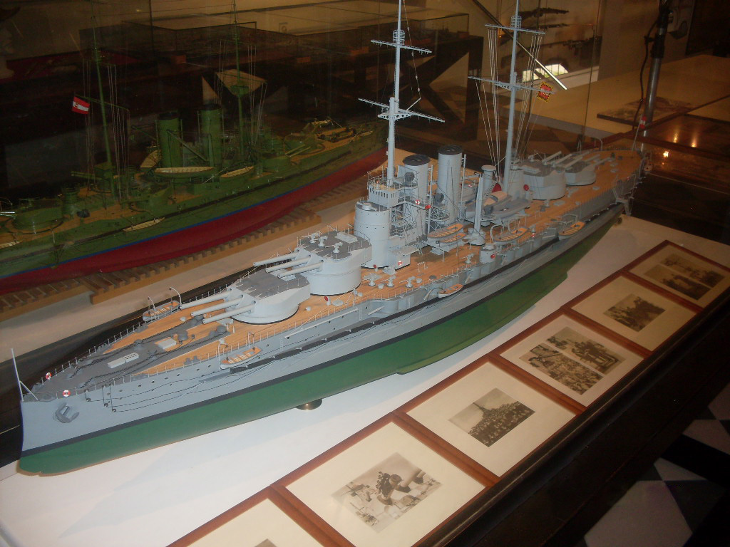 Modell SMS Viribus Unitis im k.u.k. Marine Museum in Novigrad (Kroatien)